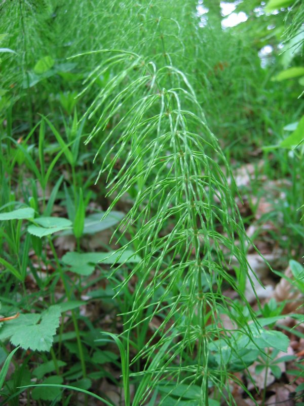 Wiesen-Schachtelhalm Equisetum pratense, Nähe Rostock